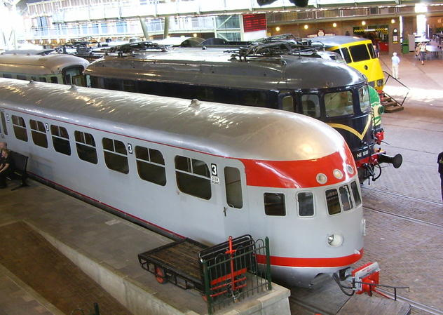 NS Materiaal 34